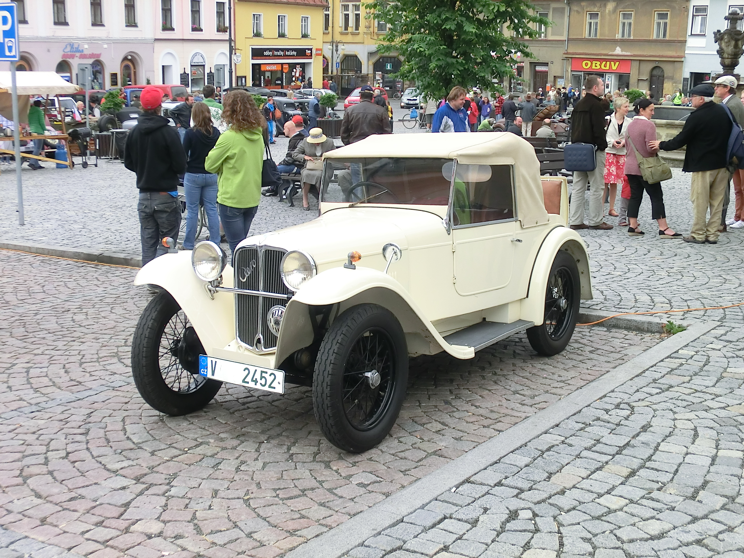 Vůz Aero na soutěži pro historická vozidla "Tatra v Českém ráji 2014", Jilemnice.